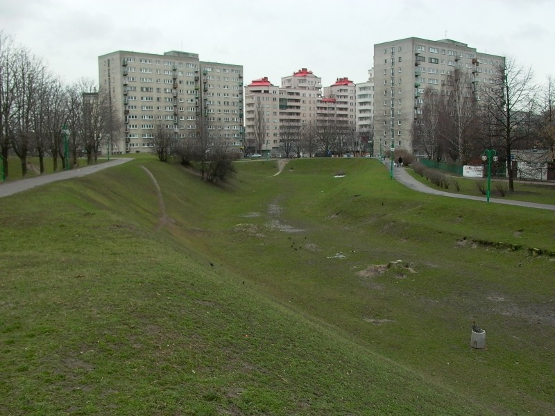 Fotografia przedstawia tzw. Fort "Rakowiec" (Fort Tscha-M) w Warszawie. Autor: Zbigniew Strucki